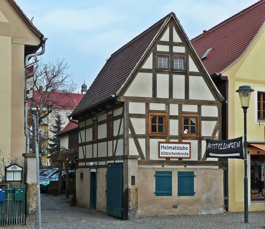 Blick auf die Heimatstube am Dorfanger in Radebeul-Kötzschenbroda. Das kleine Fachwerkhaus entstand als Auszugshaus eines Dreiseithofes.